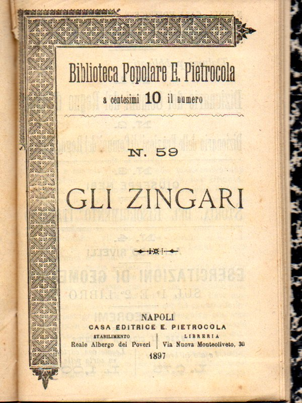 1897 Biblioteca Popolare E.Pietrocola n.59 Gli Zingari (collezione privata G.P.)